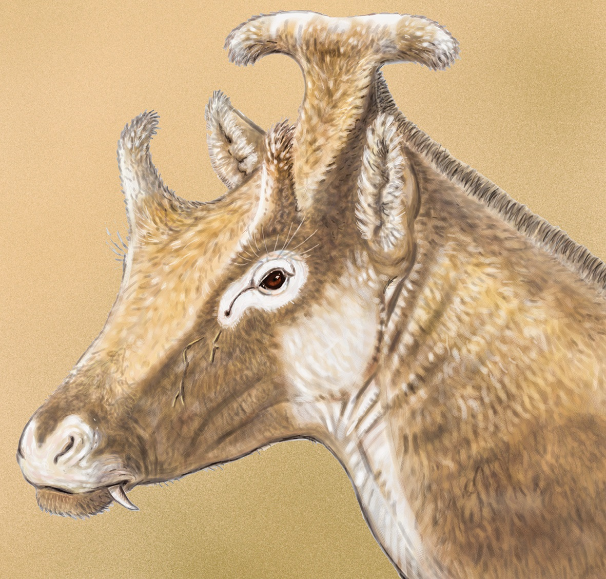 Life reconstruction of the head of Xenokeryx amidalae Adult male based on the fossils from La Retama.